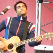 Spring, in Plopsaland De Panne, 21 May 2006, cropped image